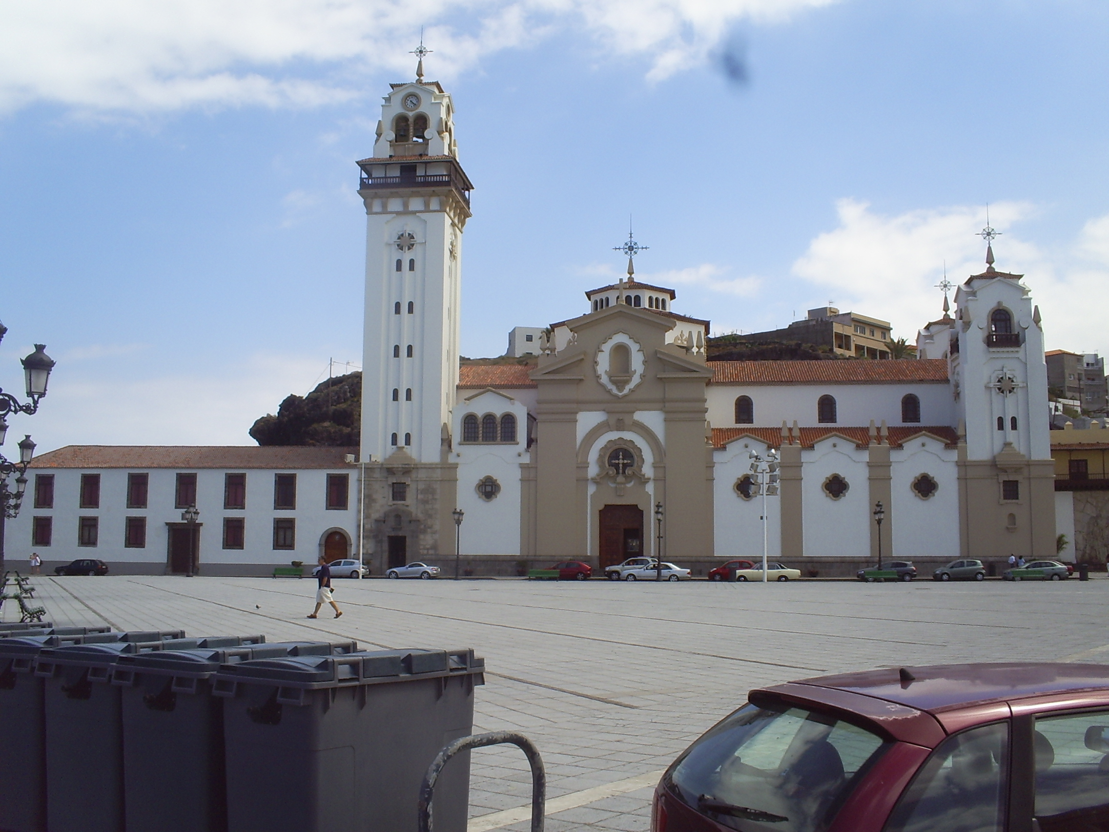 Basílica de Candelaria, Tenerife, Canarias, España